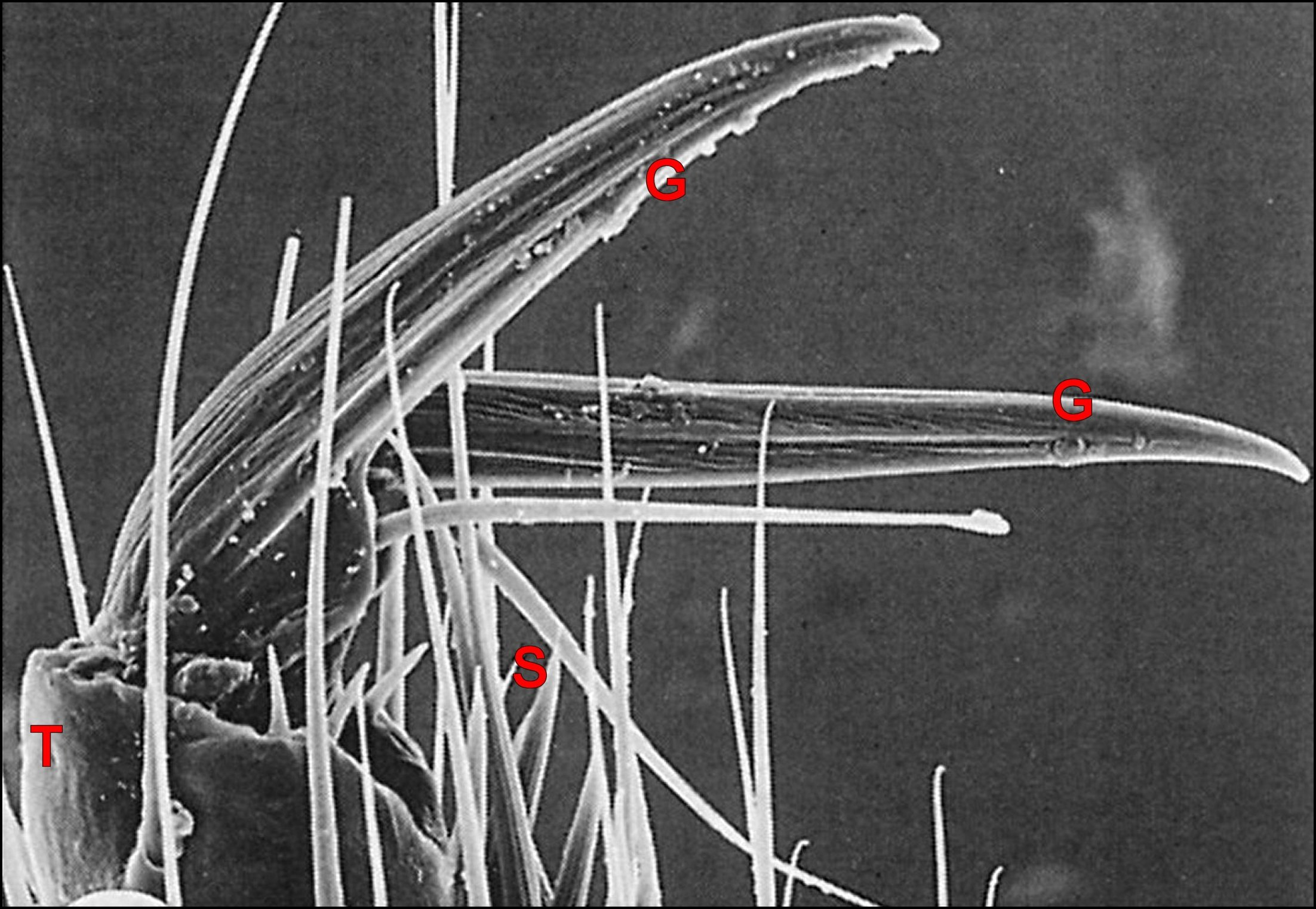 Griffes d' Arachnocoris varius (Guyane) vues au microscope électronique à balayage.